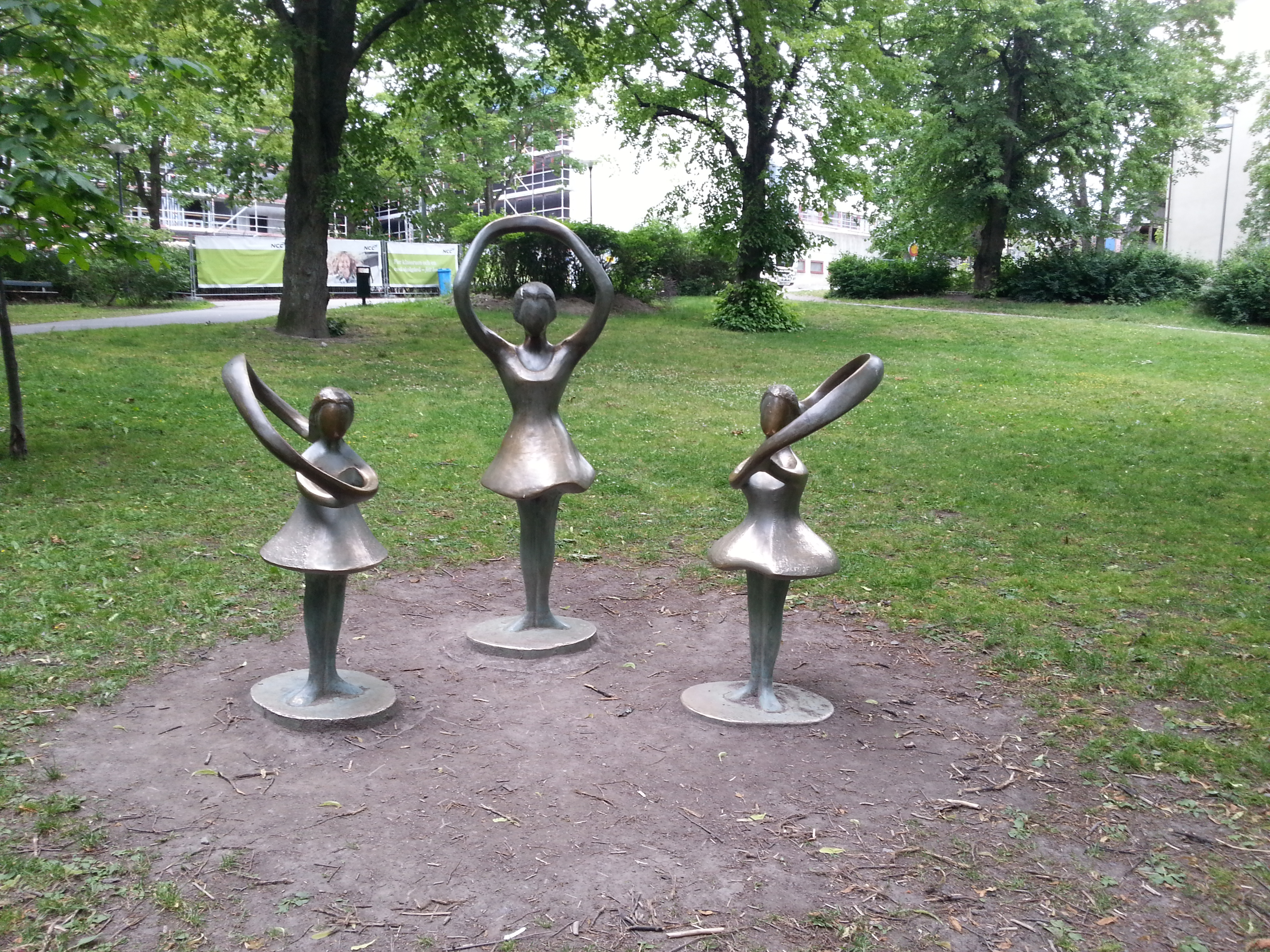 Rytmisk lek (1971) - Sonja Högström. I Tuvanparken, Sundbyberg.